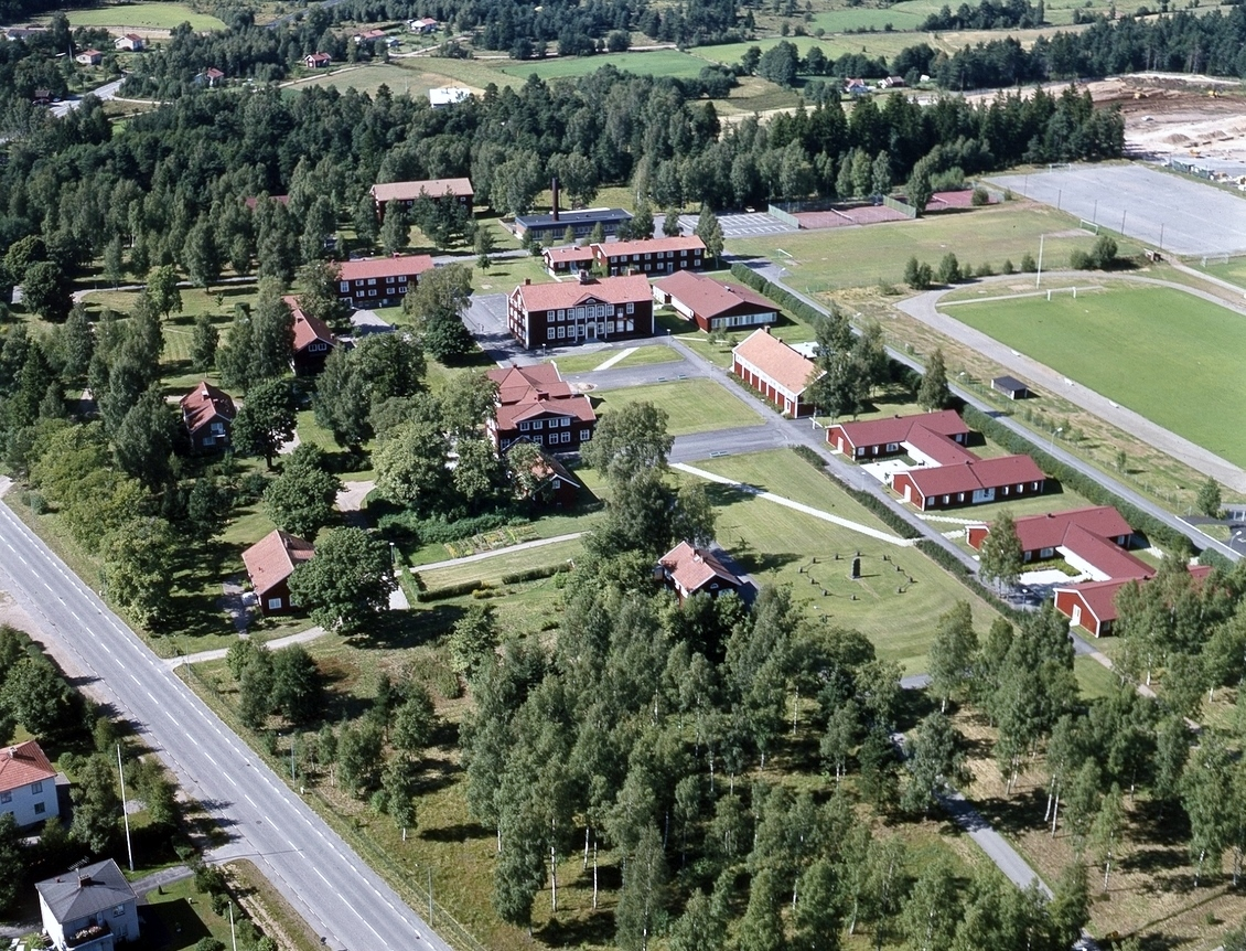 Flygbild över Fristad folkhögskola